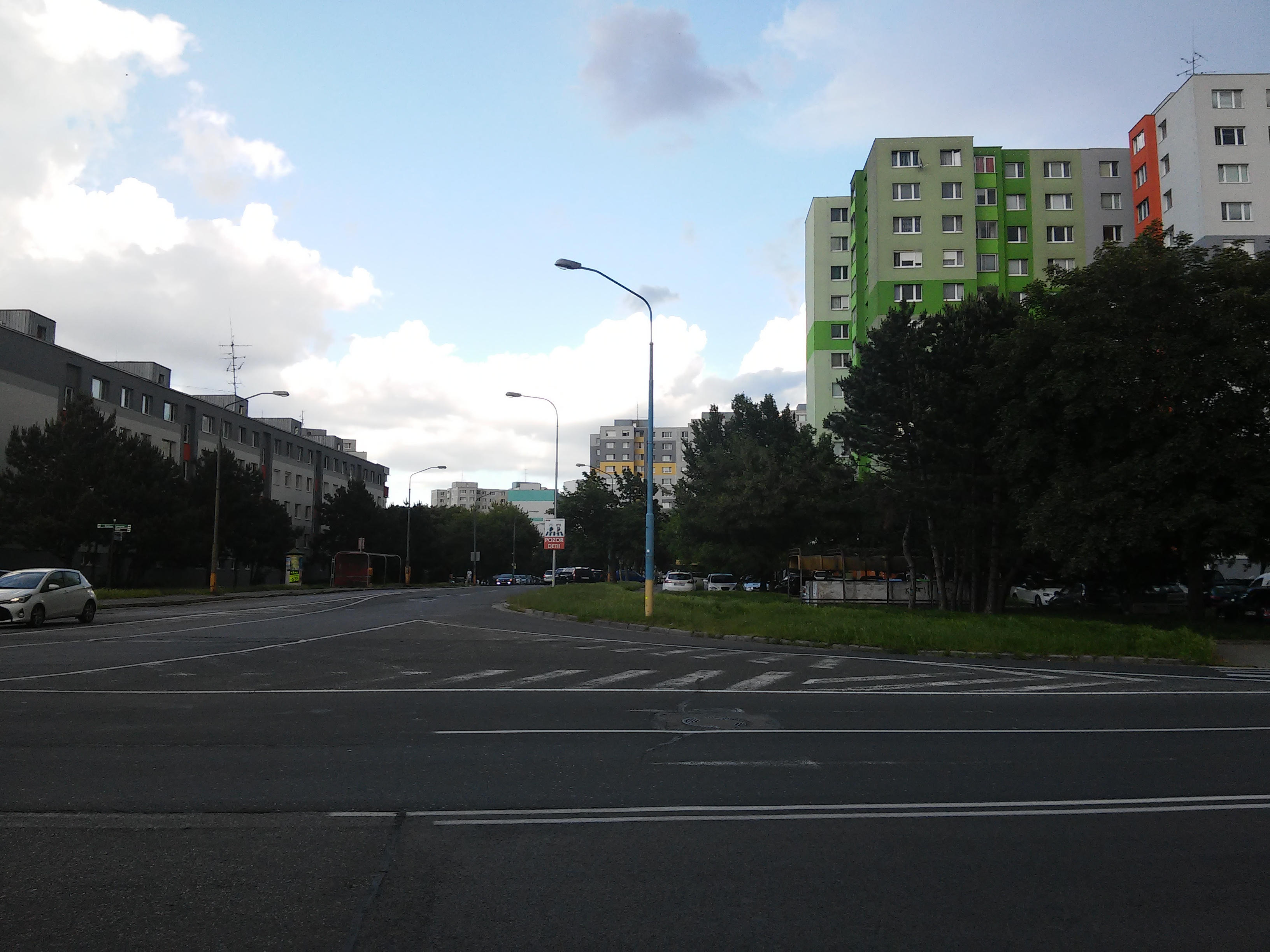 Lietavská, Petržalka, Bratislava